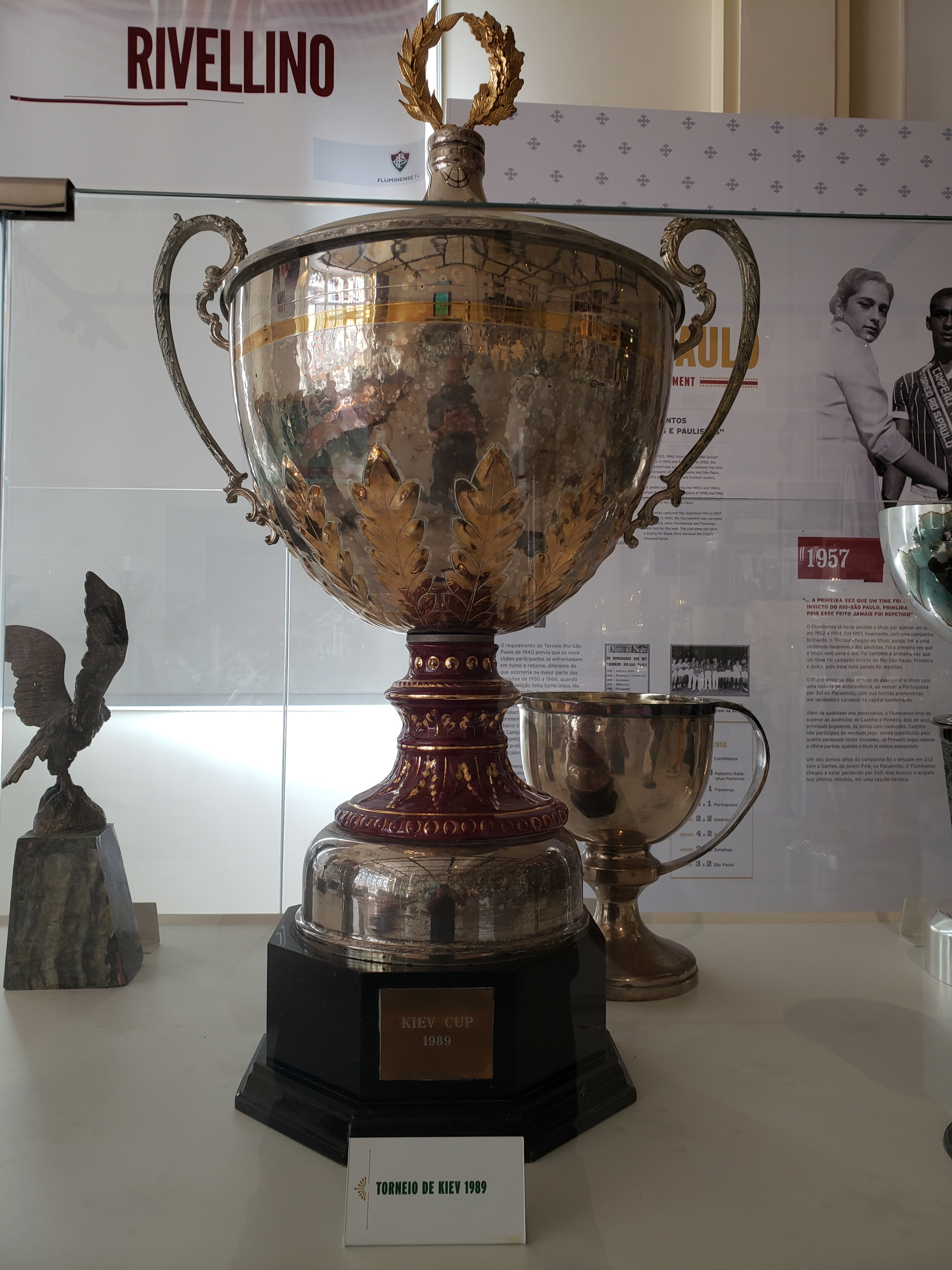 Torneio de Kiev de 1989 disputado na Ucrânia e vencido pelo Fluminense Football Club.